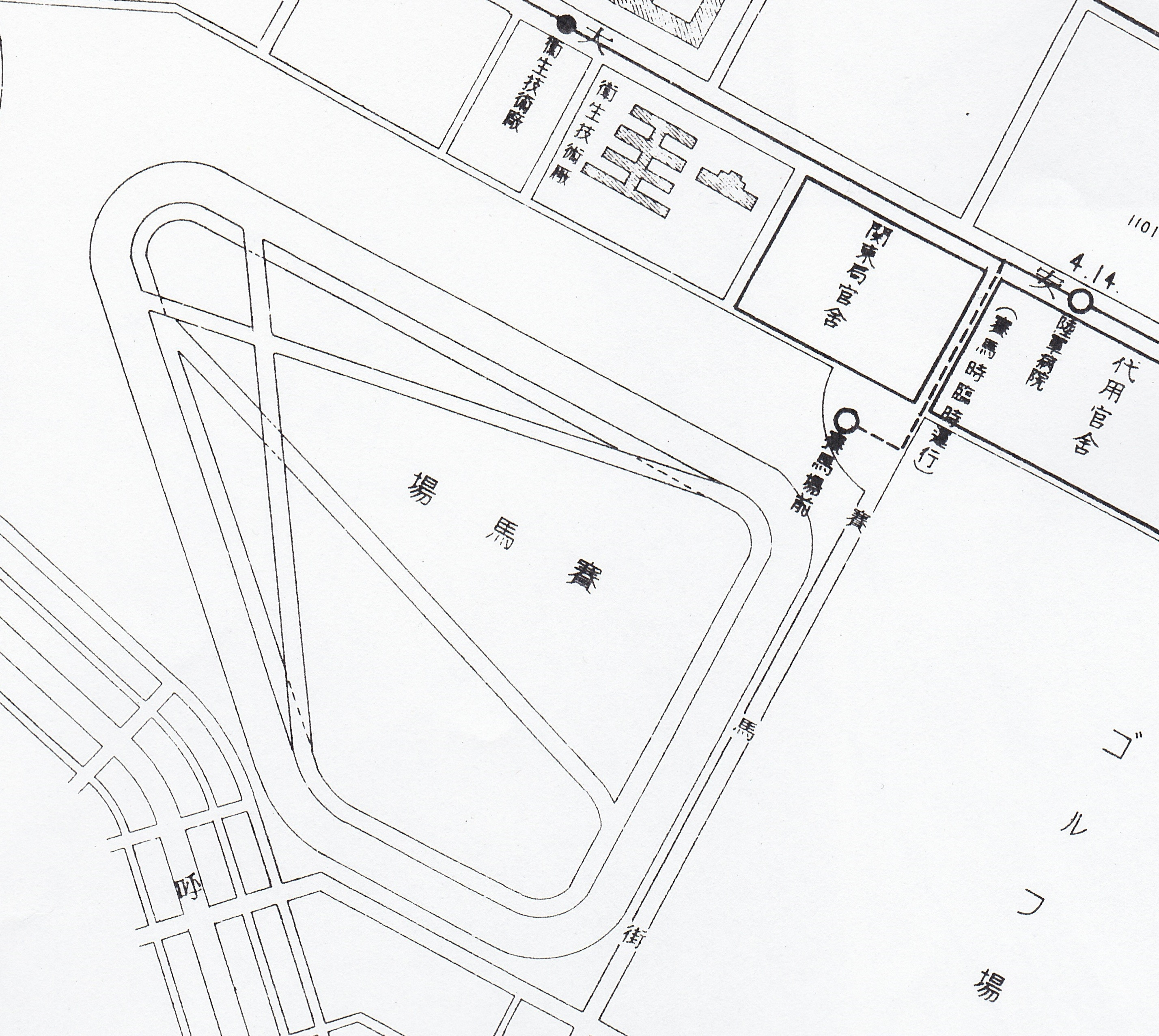 新京賽馬場図